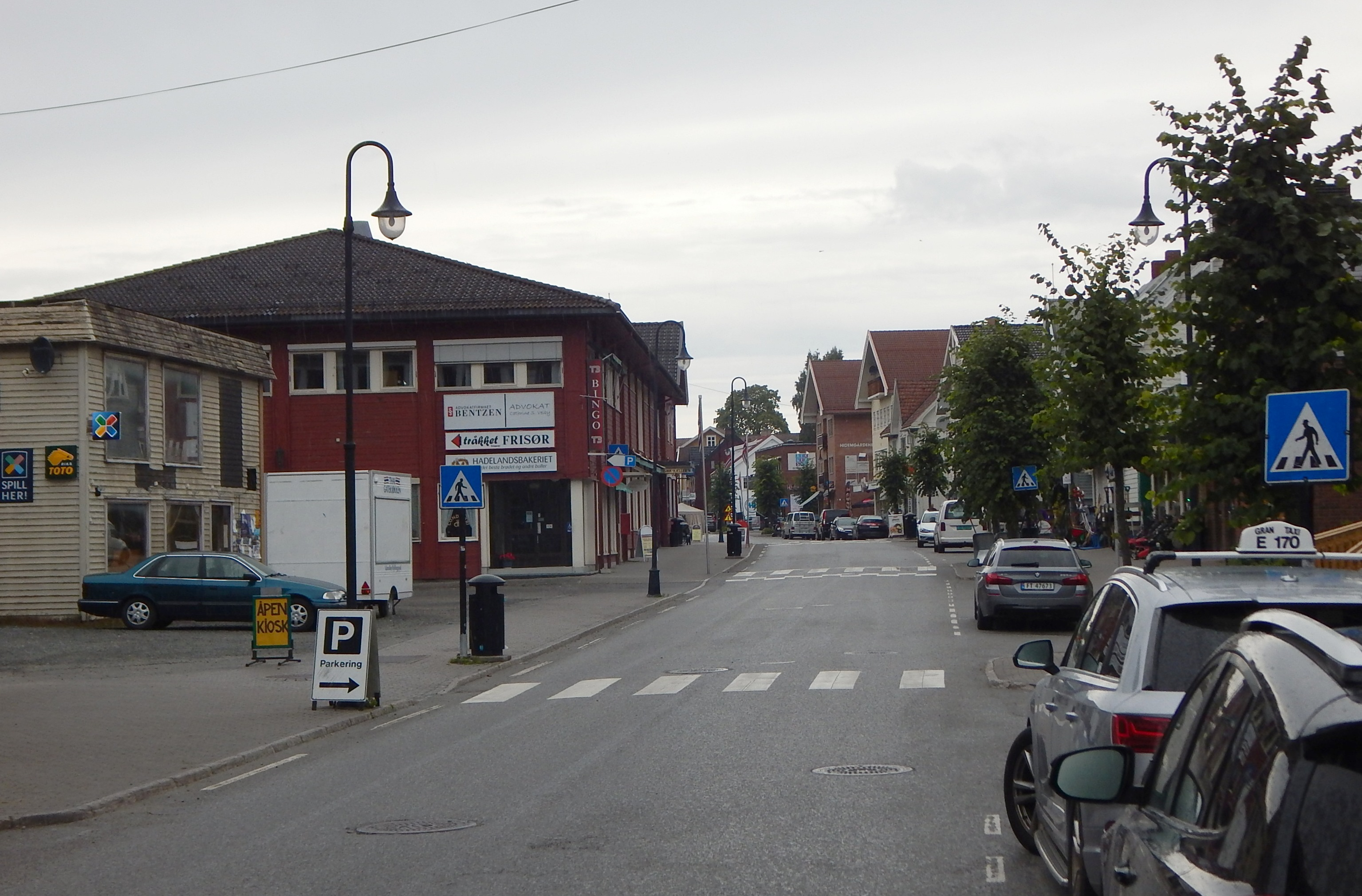 Storgata på Gran